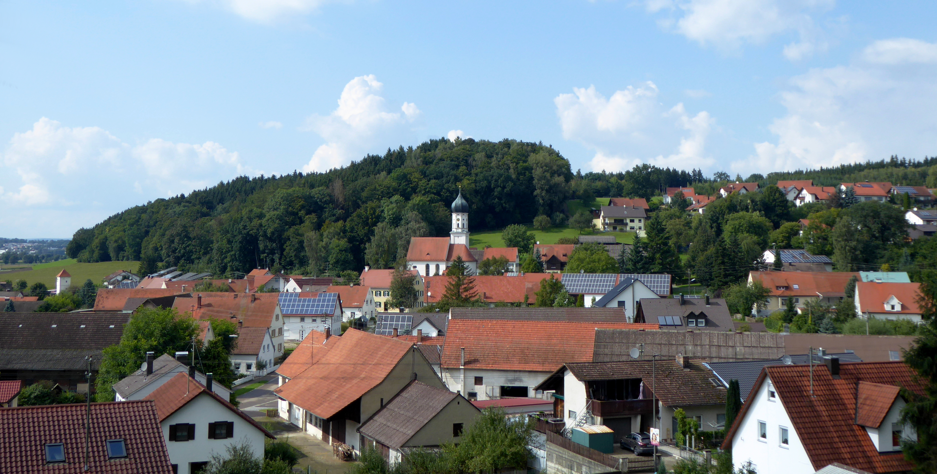 Dorfkern von Mindelaltheim